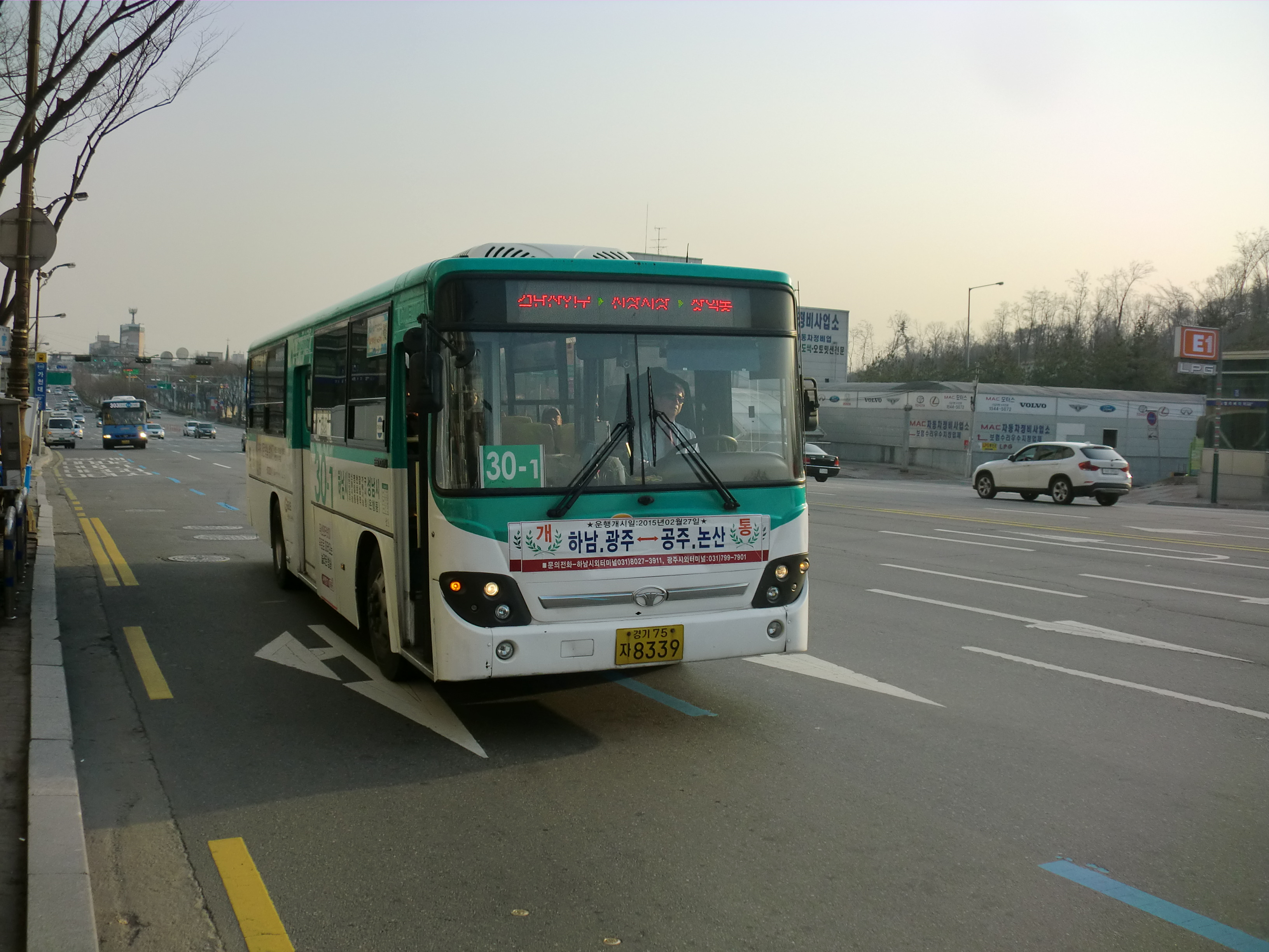 하남시내버스 30-1번(성남시에서 촬영)